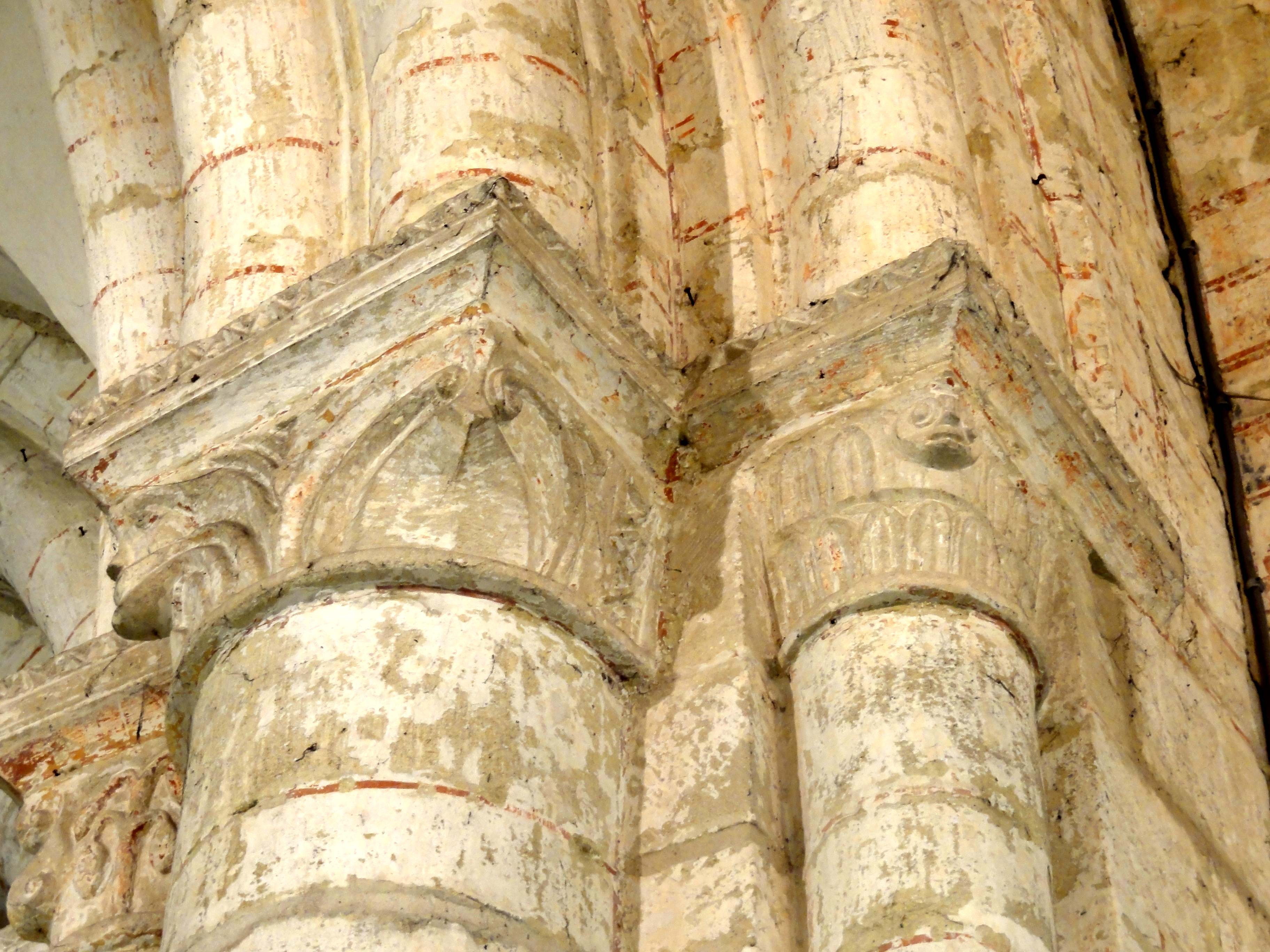 Chapiteau(x) de l'église - voir titre.